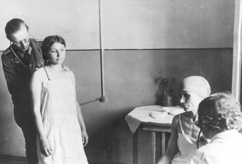 [Text Scherl:] Ukrainische Arbeitskräfte fahren nach Deutschland. -Ohne ärztliche Untersuchung darf die weite Reise nach Deutschland nicht angetreten werden. jeder Meldend wird sorgfältig untersucht. PK-Aufnahme: Knödler, 3314-42 [Text ADN:] ADN-Zentralbild/Archiv II. Weltkrieg 1939-45 In den von den faschistischen deutschen Wehrmacht besetzten Gebiet in der Ukraine, Mai 1942. Die Zivilbevölkerung in Artjomowsk [Artemowsk] (Ukraine) muß sich in dem von der deutschen Zivilverwaltung eingerichteten Arbeitsamt melden, um bei Tauglichkeit als Zwangsarbeiter in der deutschen Rüstungsindustrie eingesetzt zu werden. Untersuchung der Arbeitsdienstverpflichteten vor dem Abtransport nach Deutschland. Aufnahme: Knödler 3314-42